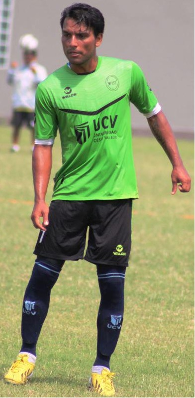 JeanTragodaraUCV7